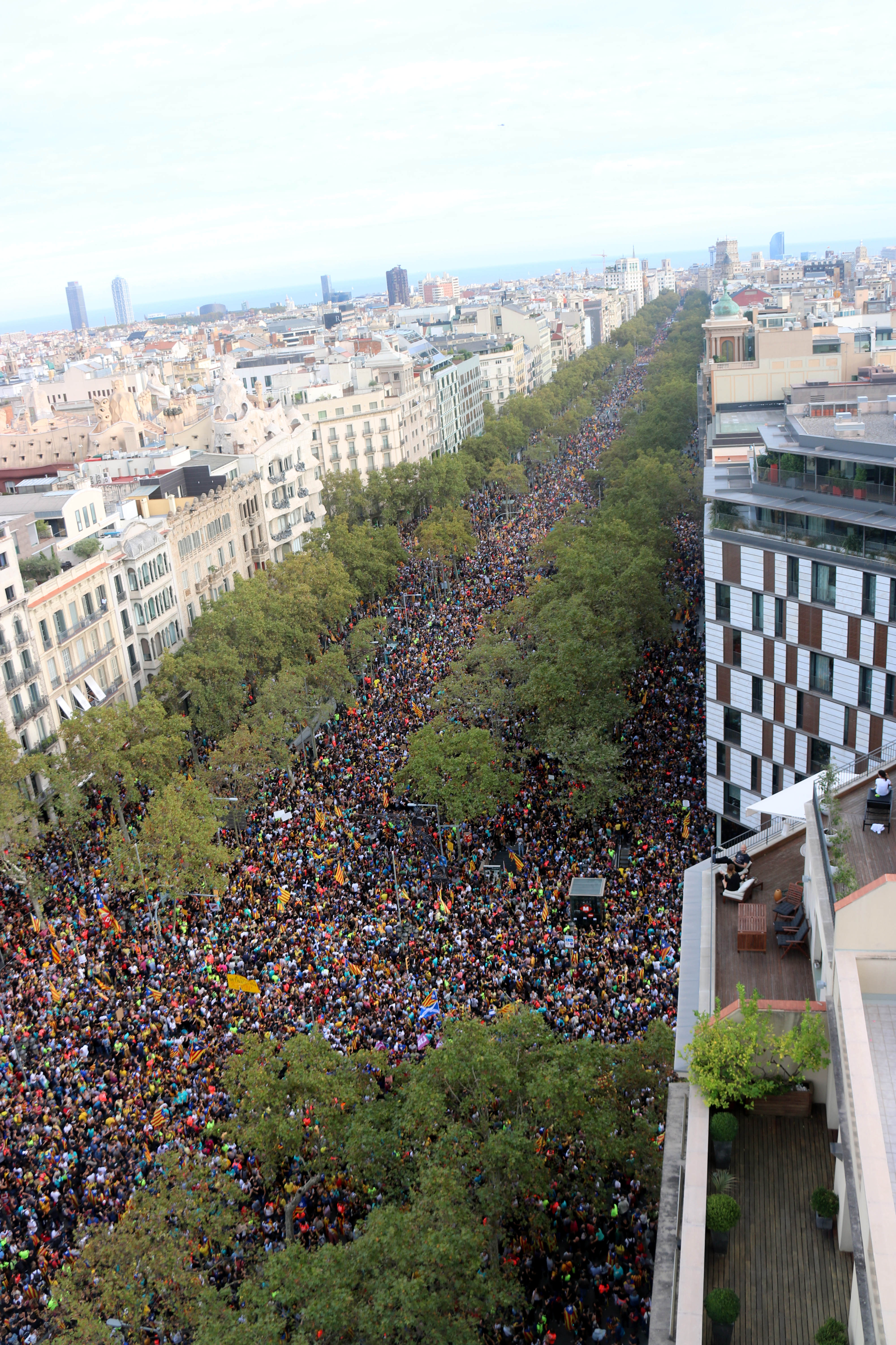 Desenes de milers de persones es manifesten al Passeig de Gràcia en l'arribada de les Marxes per la llibertat.